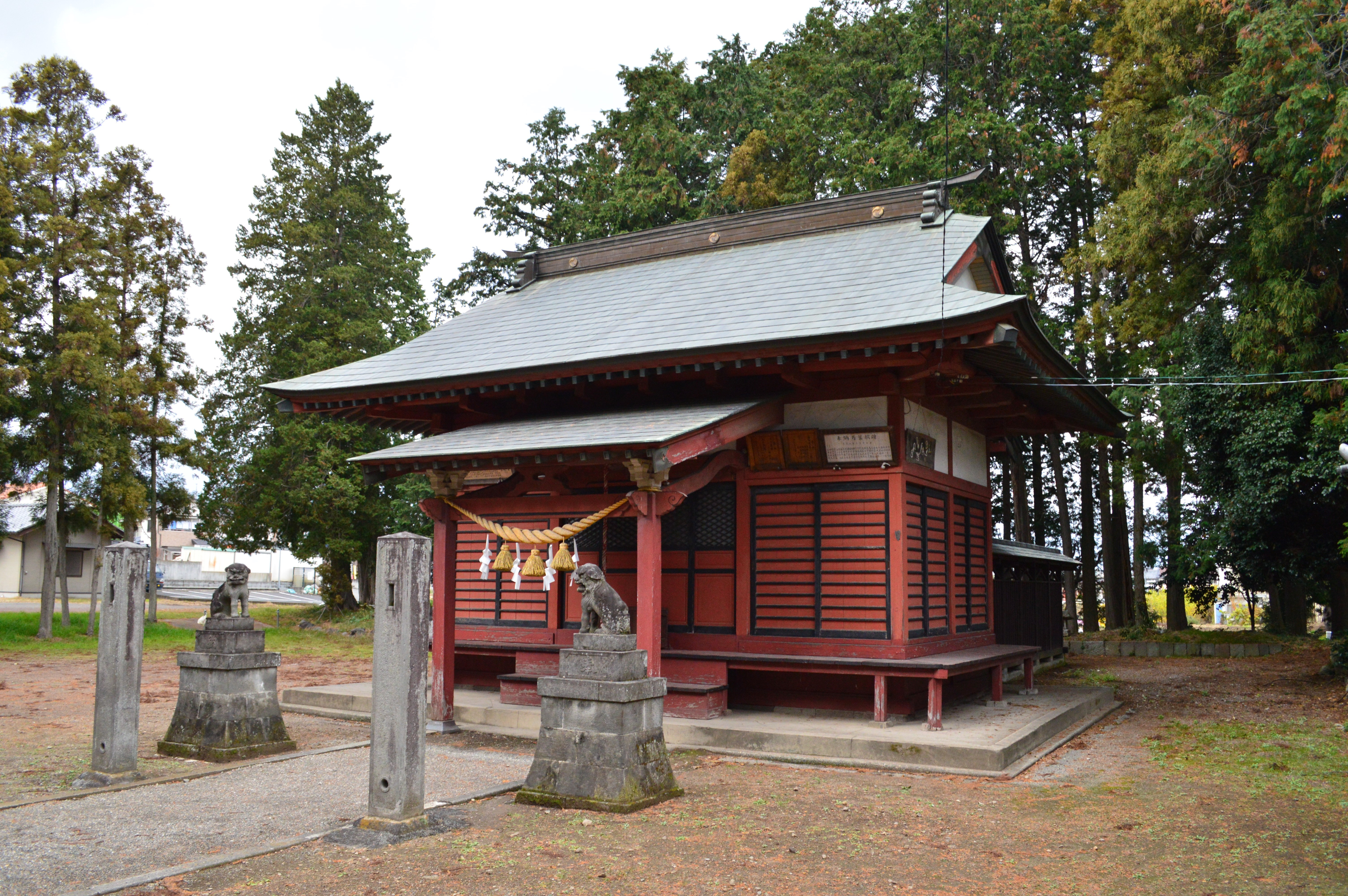 三宮神社 (吉岡町) 拝殿